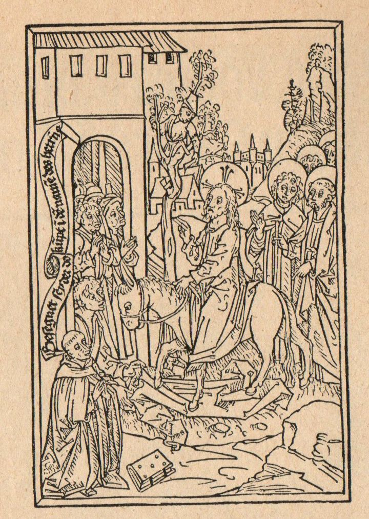 Illustration zu Petrus Nigers Stern des Meschiah, Holzschnitt